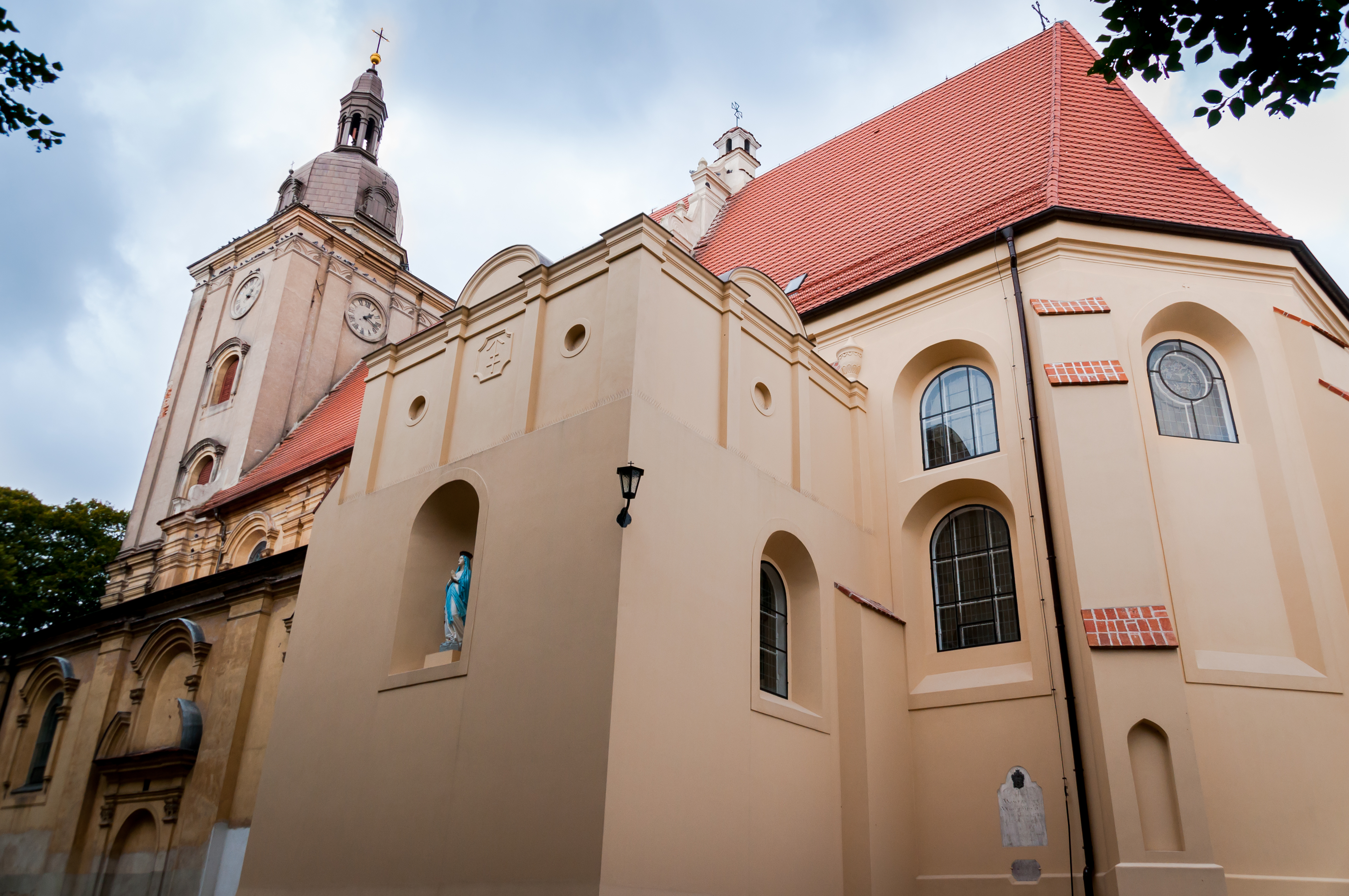 Koźmin Wielkopolski, kościół par. p.w. NMP i św. Wawrzyńca, 1462, 1670-1677, 1756, 1859,1929